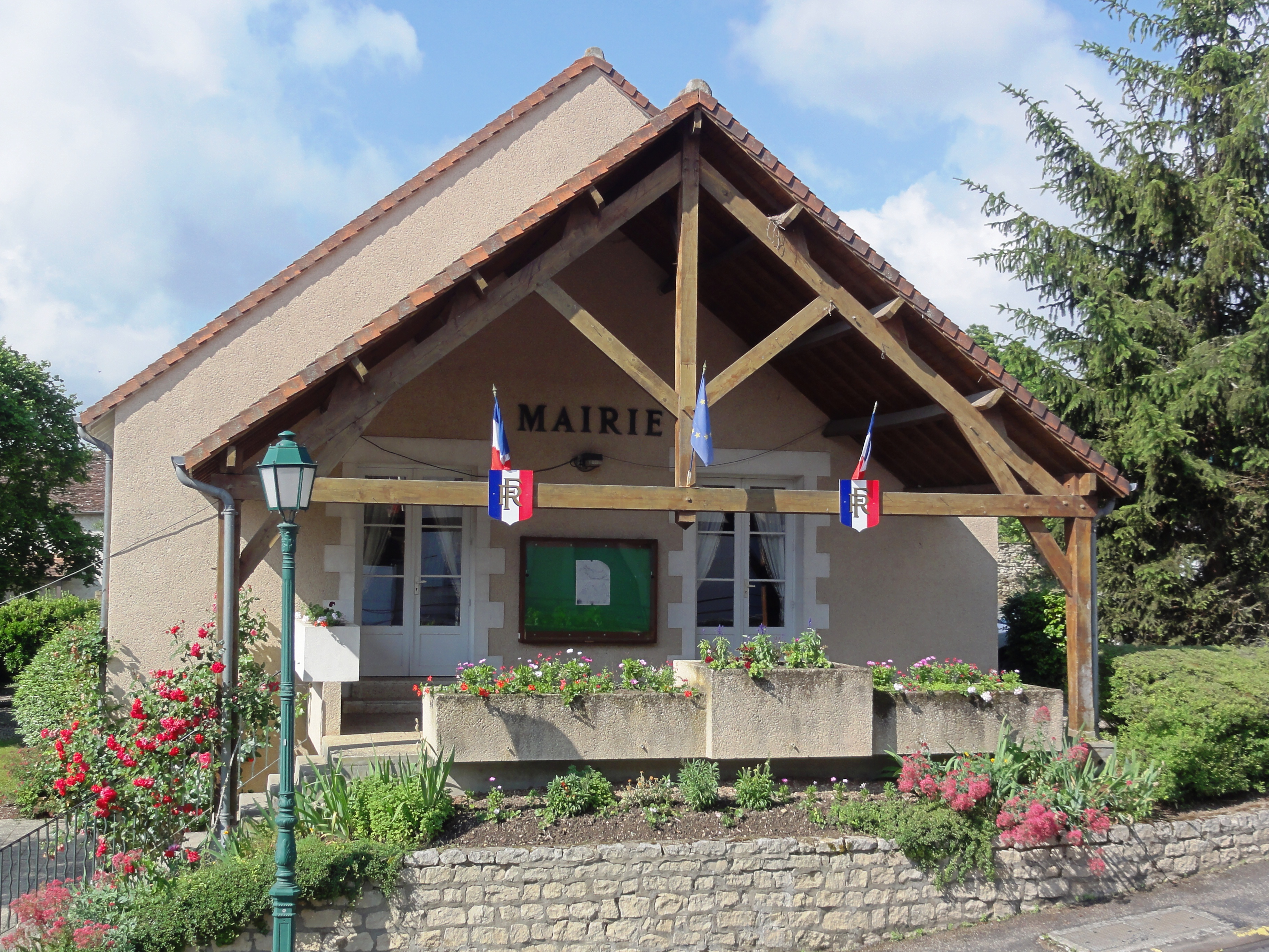 Vaux-sur-Vienne (Vienne) Mairie